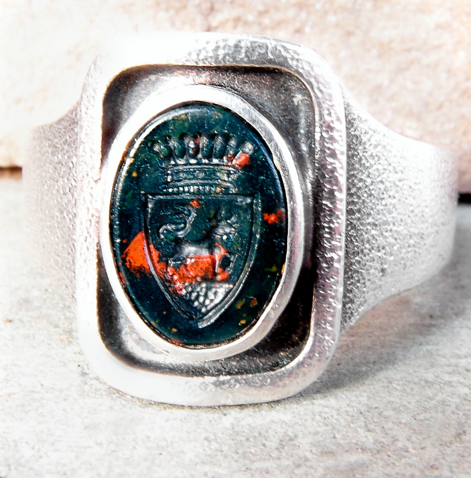 Das historische Freiherrensiegel der Plessen aus dem Nachlass des Ministers und Ministerpräsidenten (1836) Mecklenburg-Schwerins, Leopold Engelke Freiherr v. Plessen, Rittergut Dolgen bei Laage in Mecklenburg (heute: Mecklenburg-Vorpommern) * Datum: 01.11.2011 * Urheber: unbekannter Steinmetz resp. Juwelier * Quelle: historischer Siegelring um 1830 - im pers. Eigentum des Ur-Ur-Urenkels Michael Josef Pfeiffer alias Benutzer:Gordito1869; Hinweis: Das altehrwürdige Siegel der freiherrlichen Plessen (vormalig in einem Goldring eingefasst), wurde Rosemarie Hedwig geb. Freiin von Plessen a.d.H. Dolgen infolge der Hochzeit ihrer Tante Auguste Ida (a.d.H. Dolgen) a.D. 1903 mit Otto von Bülow auf Rogeez i.R.d. freiherrlich-familiären Tradition nach ihrer Geburt weiter gegeben.